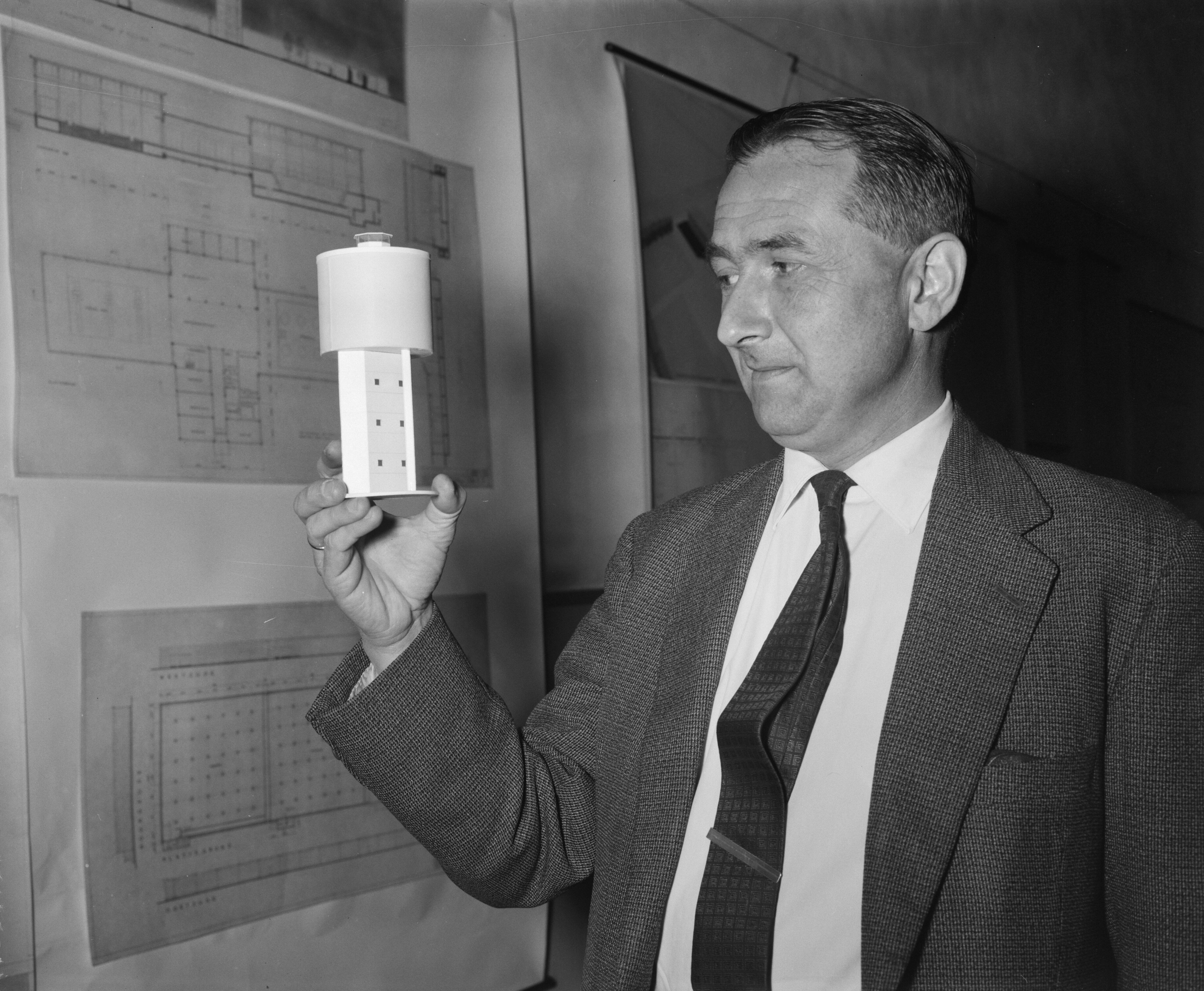 Collectie / Archief : Fotocollectie Anefo Reportage / Serie : [ onbekend ] Beschrijving : Persrondgang langs duinwatertuinplaats in de Gem. Waterl. Ir. L. Huisman met ontwerp voor nieuwe pompst. Datum : 20 april 1961 Persoonsnaam : Ir. L. Huisman Fotograaf : Bilsen, Joop van / Anefo Auteursrechthebbende : Nationaal Archief Materiaalsoort : Negatief (zwart/wit) Nummer archiefinventaris : bekijk toegang 2.24.01.04 Bestanddeelnummer : 912-3724